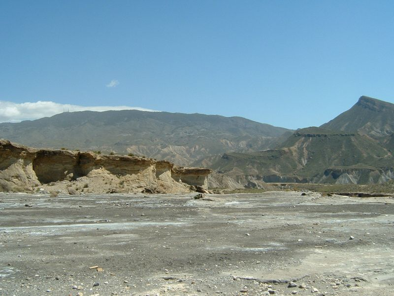 Desierto de Tabernas (Almería, Andalucía, España)